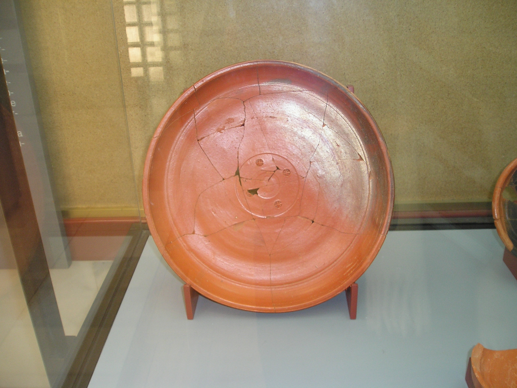 Plato de terra sigillata bajoimperial depositado en el Museo Numantino de Soria, en el que aparecen estampillados cuatro cruces.